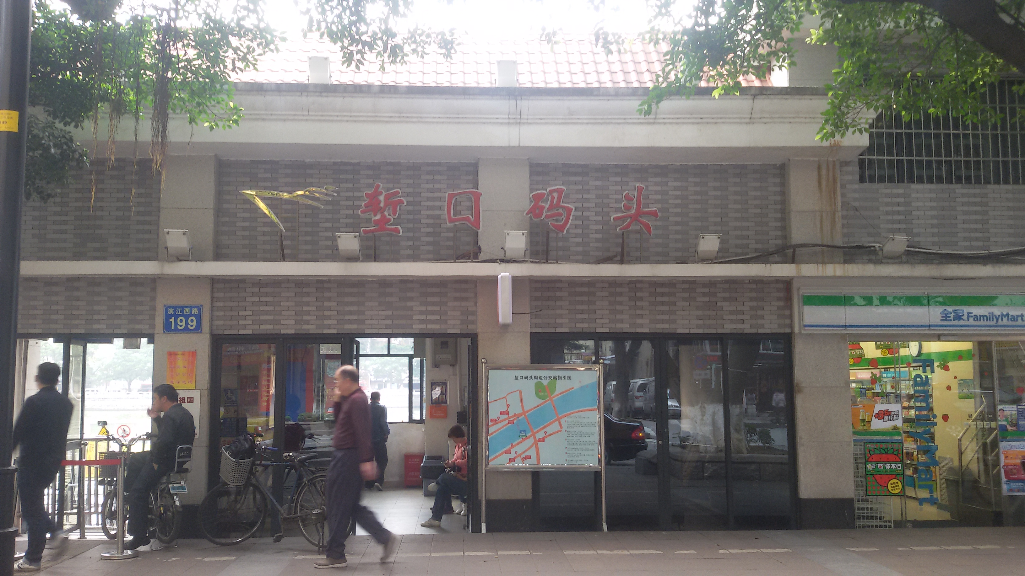 粵語: 塹口碼頭